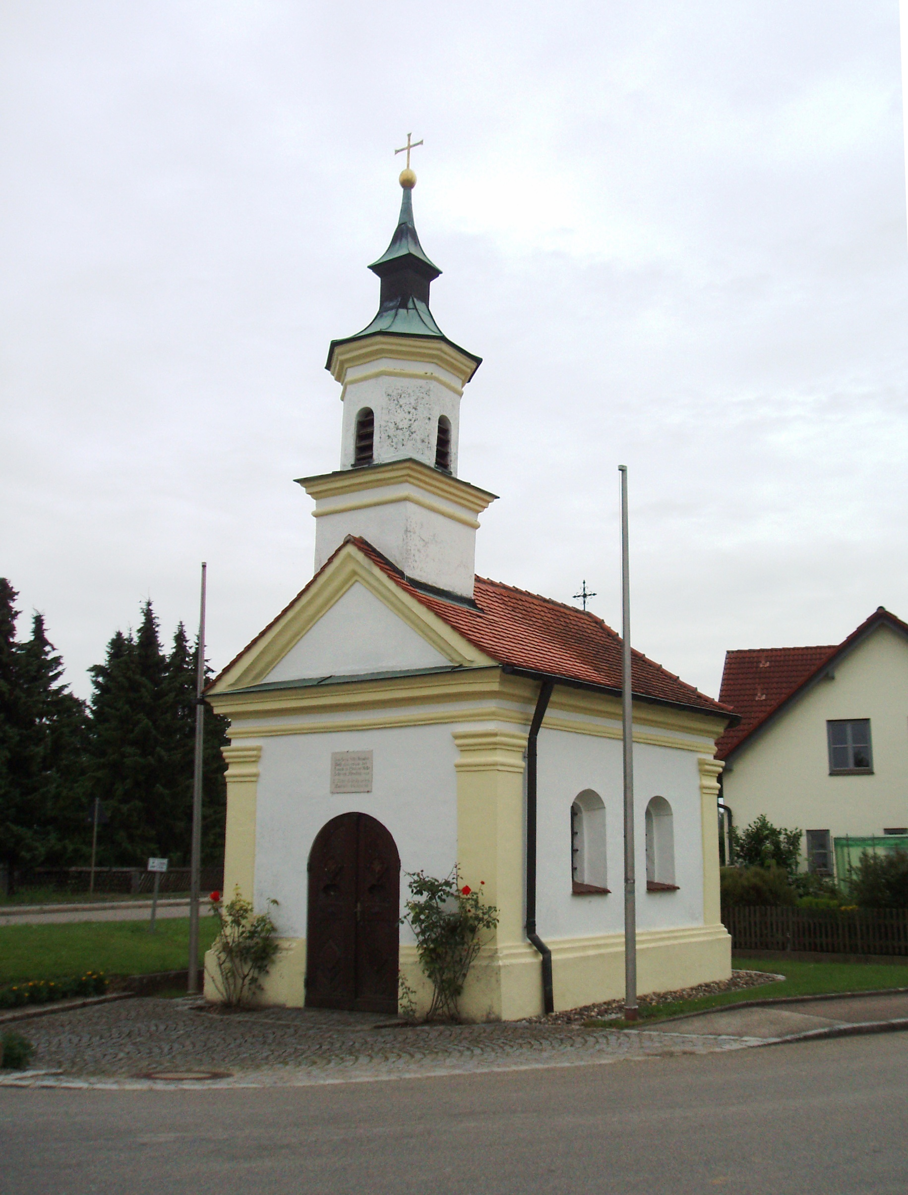 Mindelstetten_im_Landkreis_Eichstätt,_Altöttinger_Kapelle